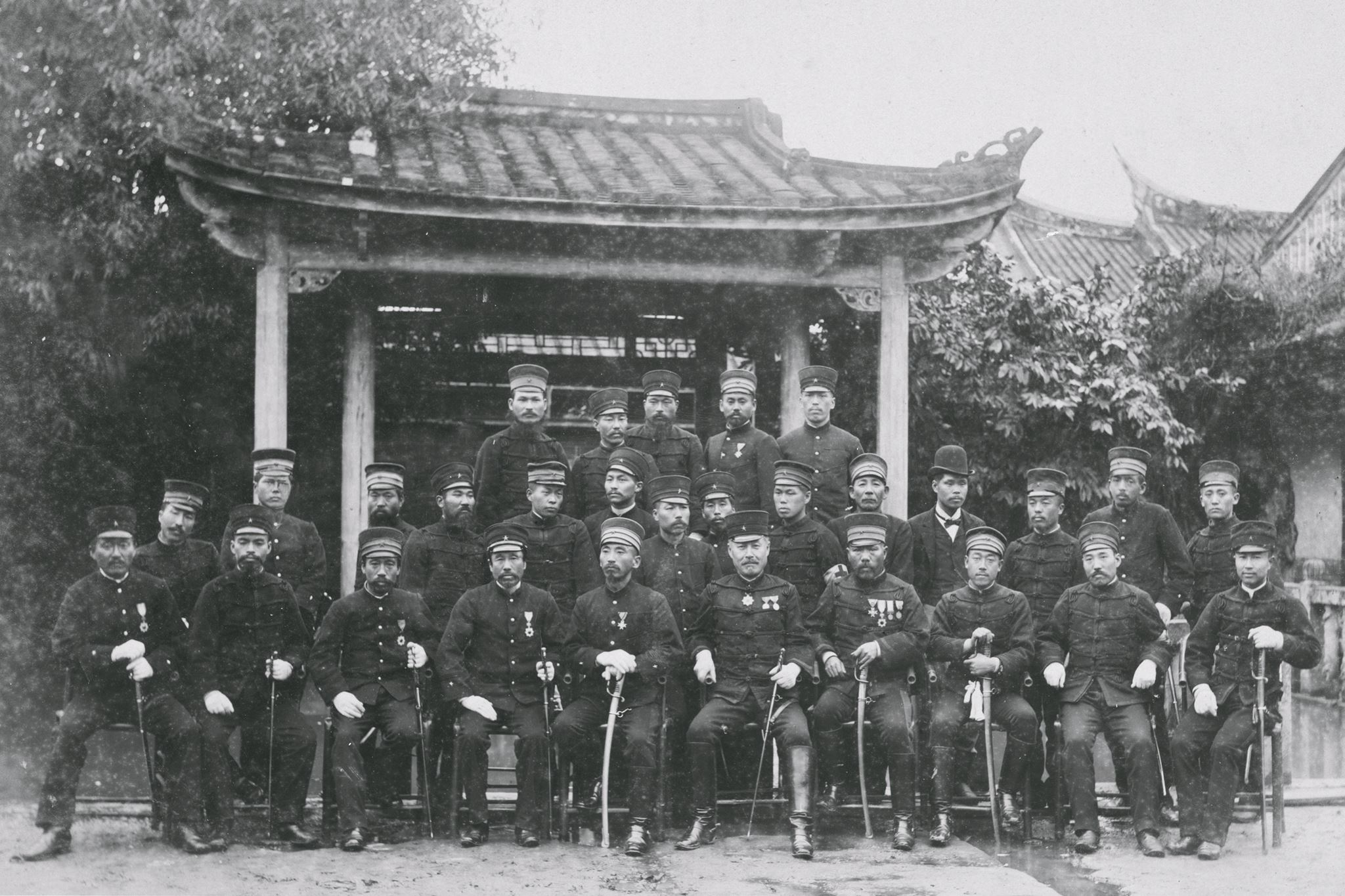 近衛師團成員，板橋林本源園邸。